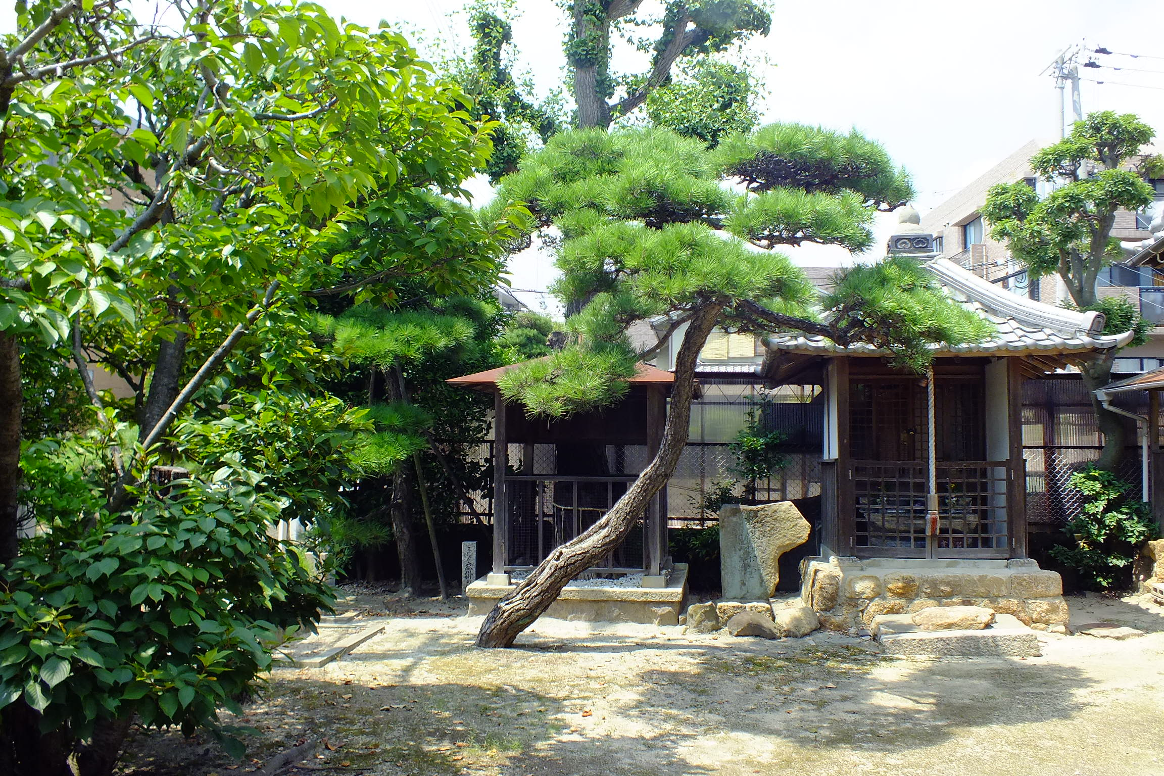 Matsukaze Murasame Dou 松風村雨堂 神戸市須磨区離宮前町1丁目2